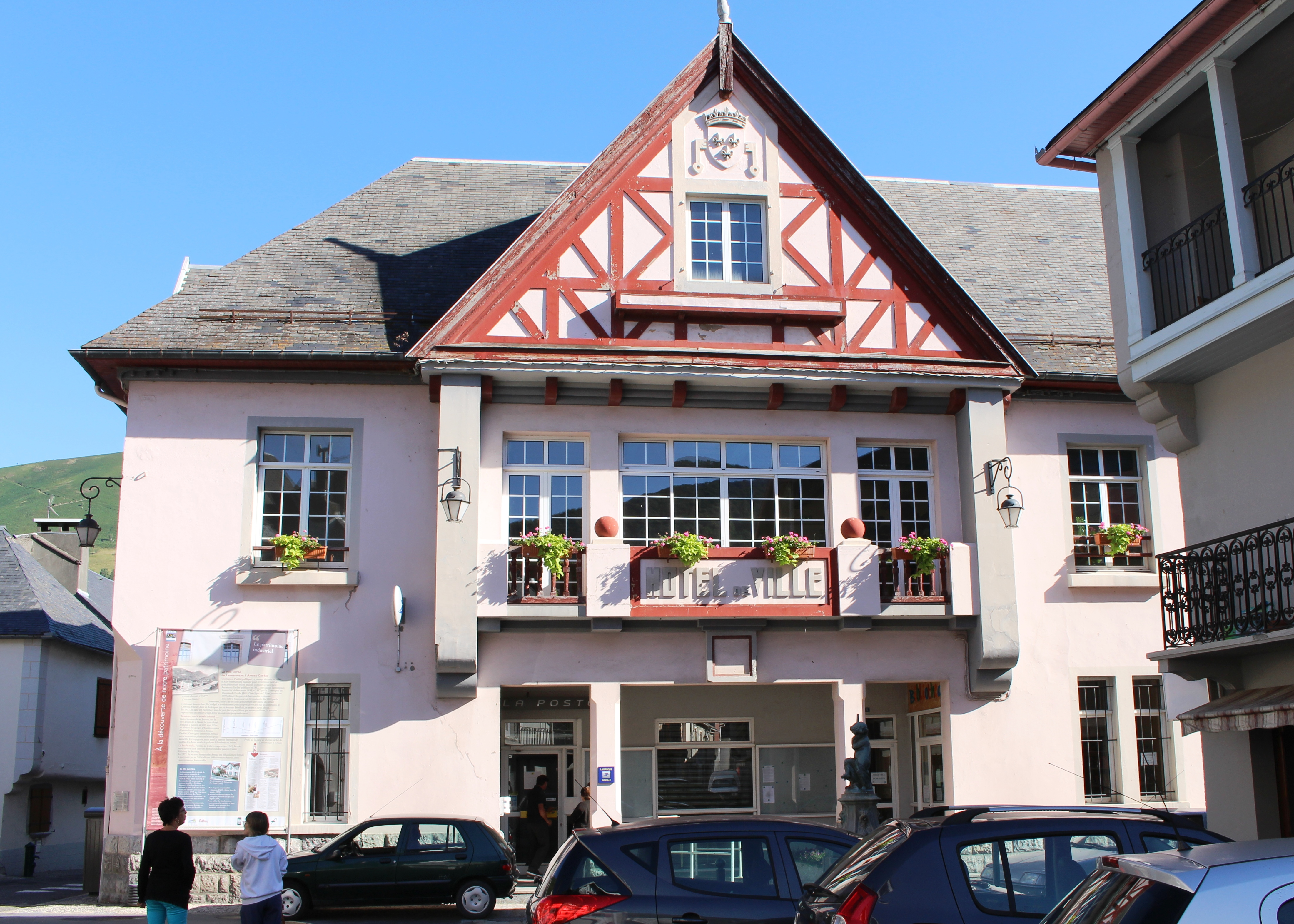 Mairie de Sarrancolin (Hautes-Pyrénées)